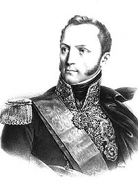 Portrait de Auguste Jean-Gabriel de Caulaincourt.